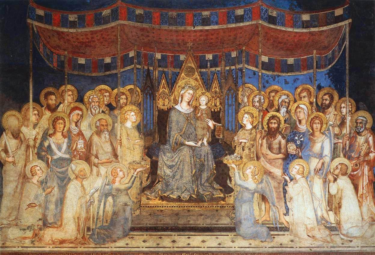 Maesta011_simone_martini.